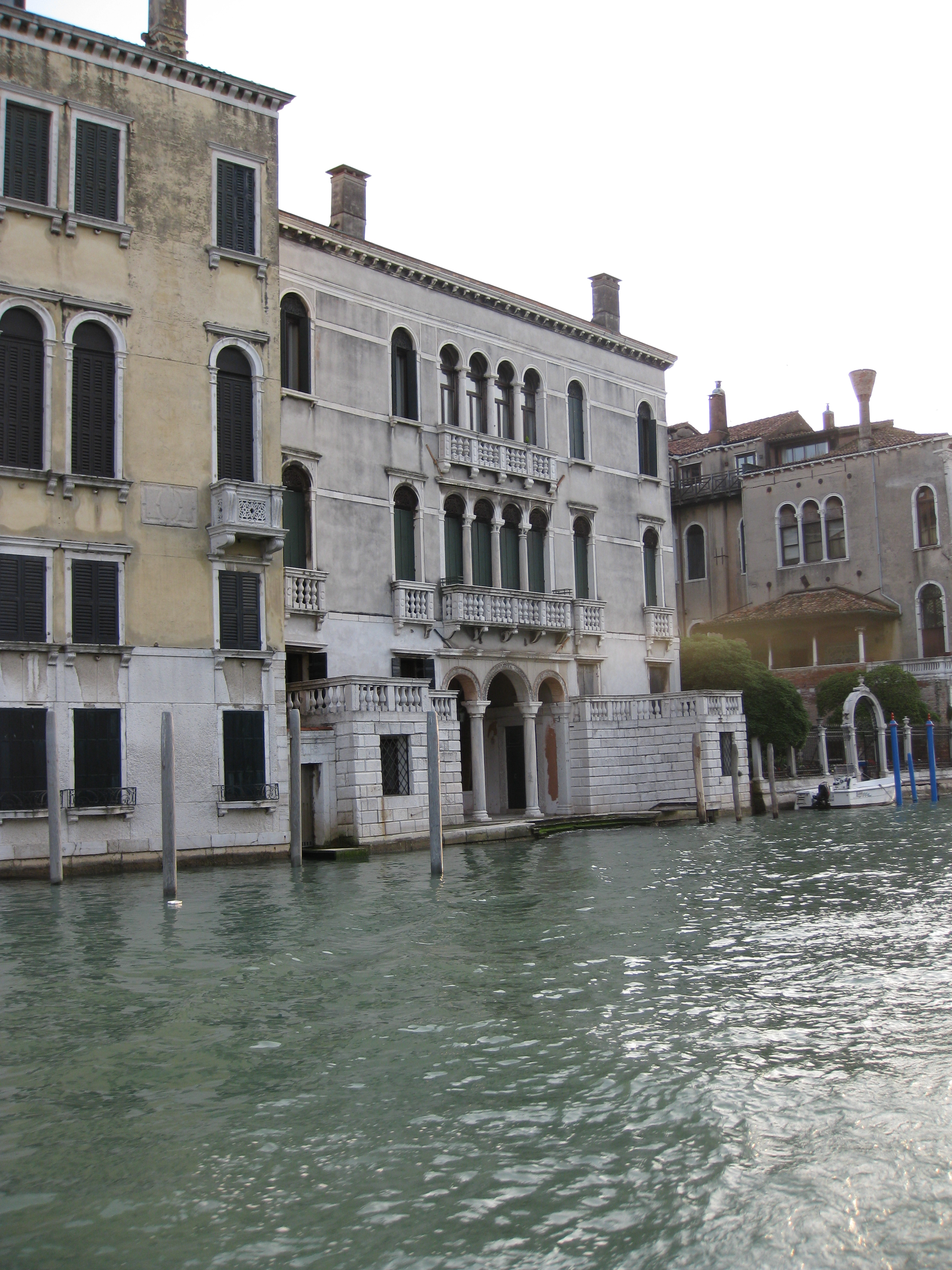 Palazzo Balbi-Valier Sammartini on the Grand Canal (Venice) ארמון ונציאני על גדת התעלה הגדולה